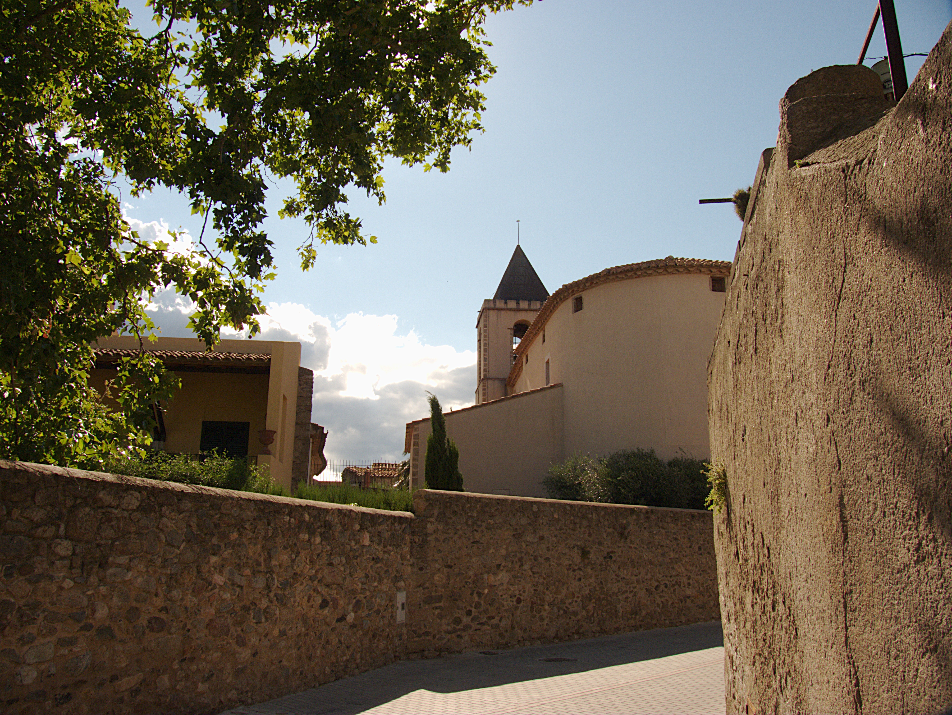 Église paroissiale, Sant Climent Sescebes (Haut-Ampurdan, Gérone, Catalogne, Espagne)